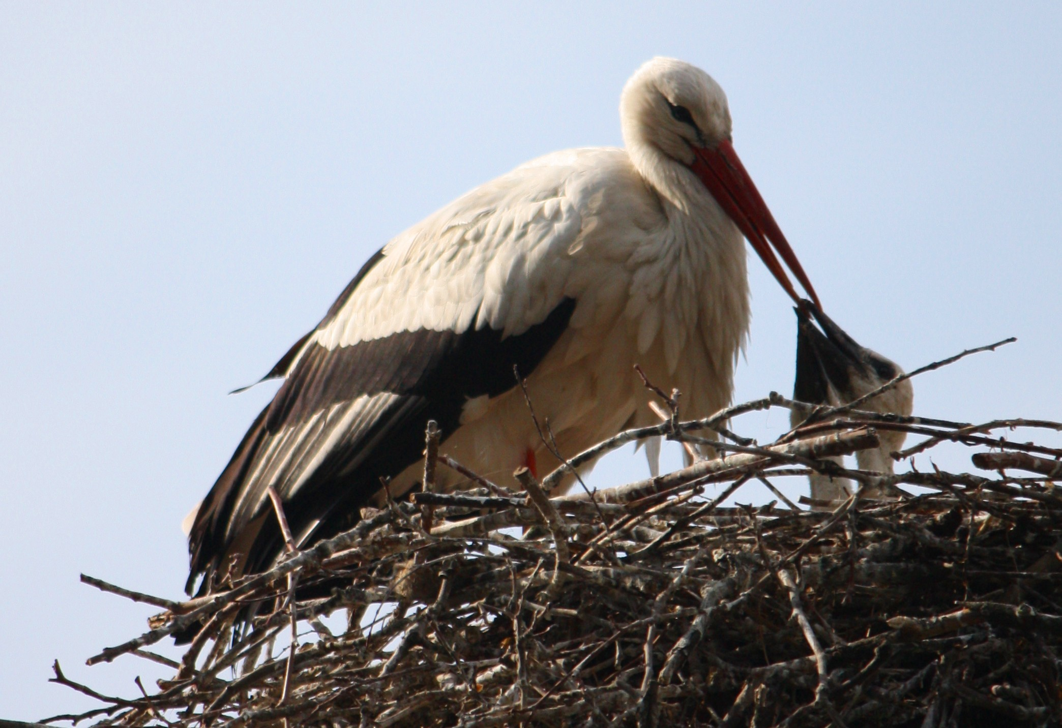 Weißstorchjungen nahe der Orangerie, Straßburg